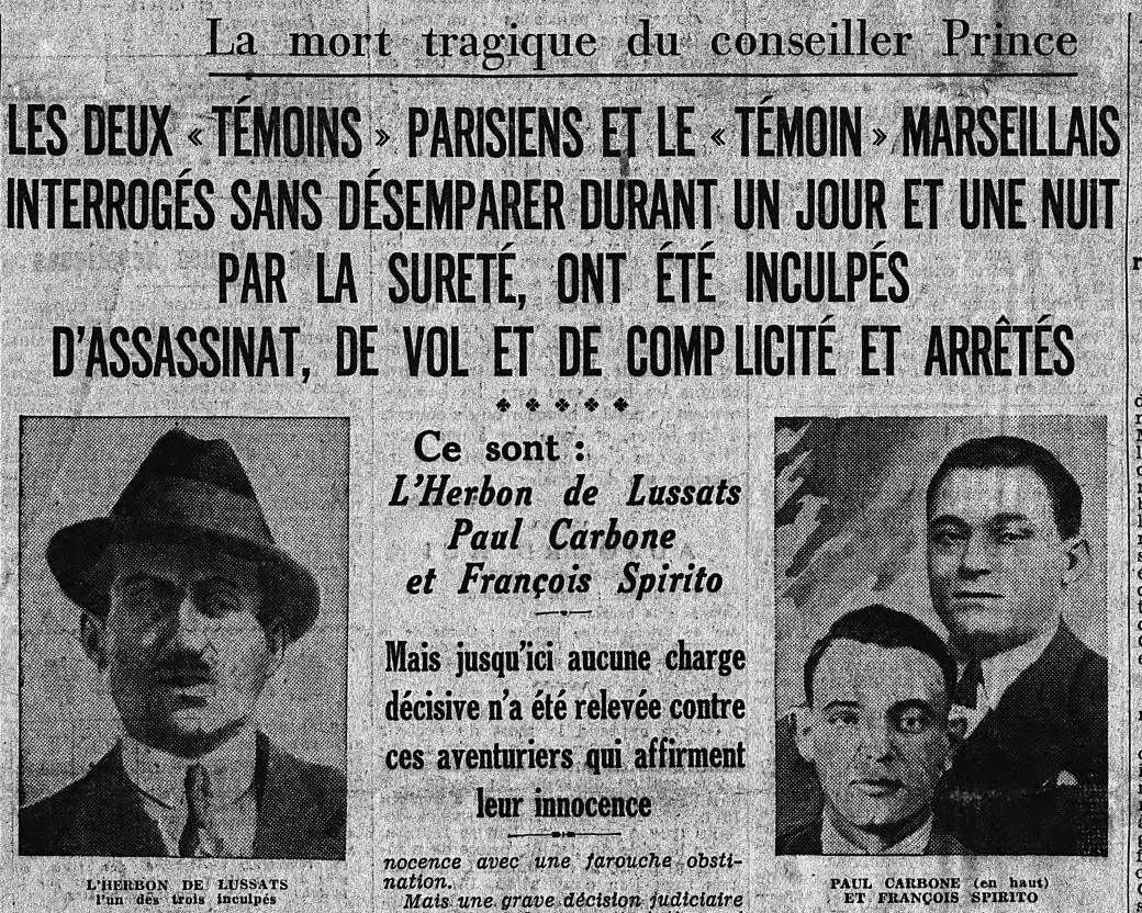 Une du journal Le Matin, le 30 mars 1934, annonçant l'arrestation de Paul Carbone, François Spirito et Gaëtan de Lussats, lors de l'affaire Prince, à l'initiative de l'inspecteur Pierre Bonny.